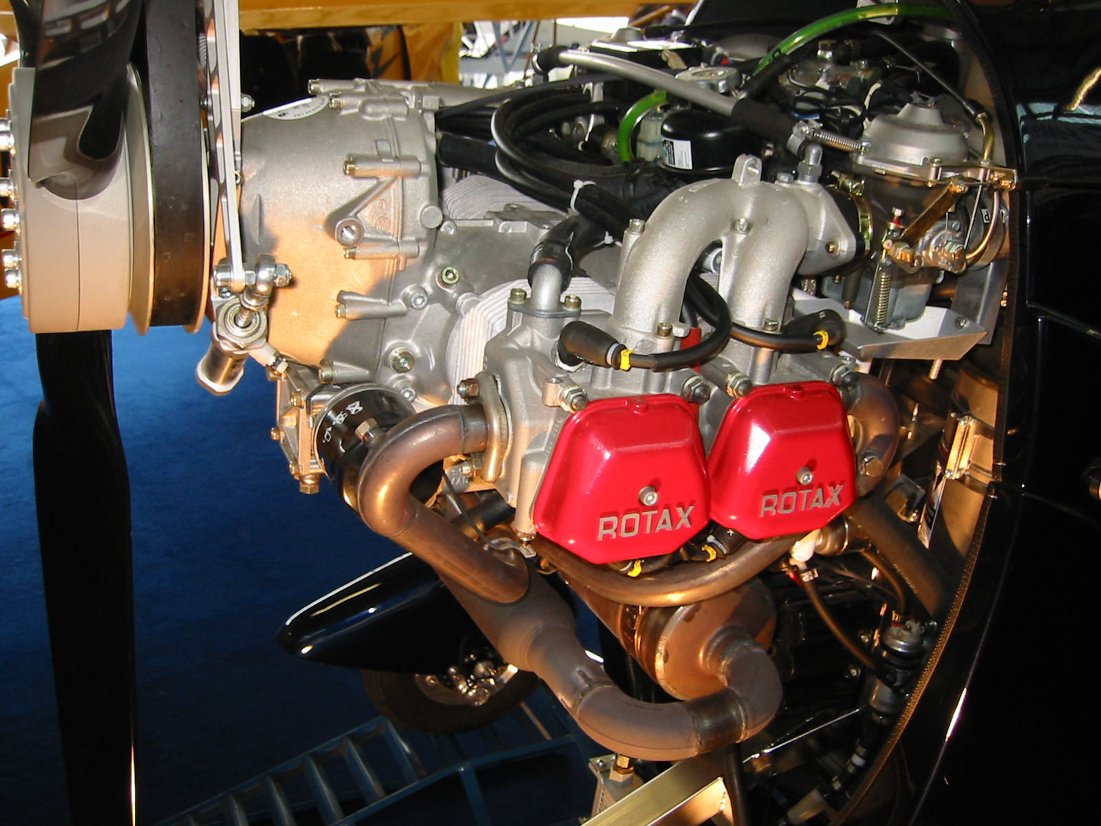 Moteur Rotax 914 avec une hélice MT03